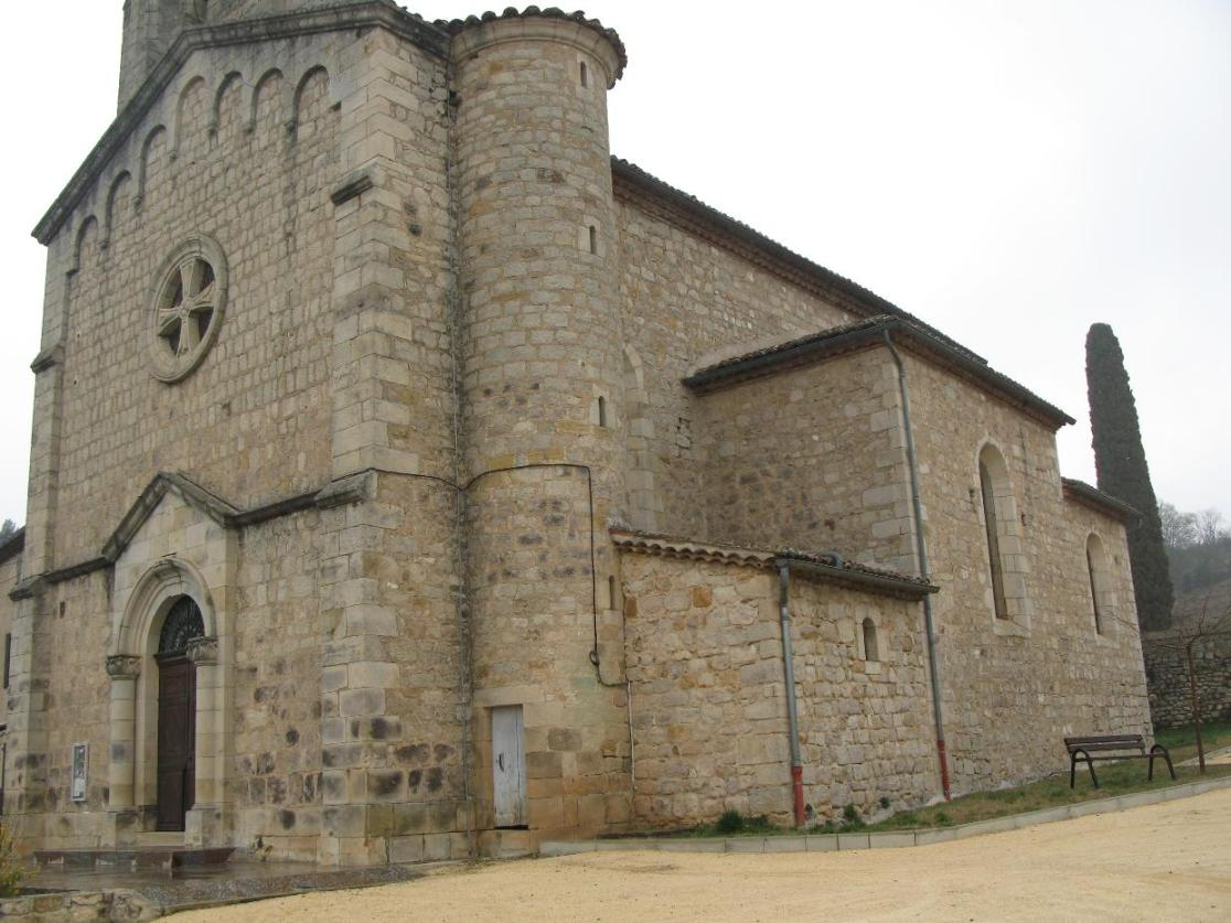 Village de Saint-Genest de Beauzon